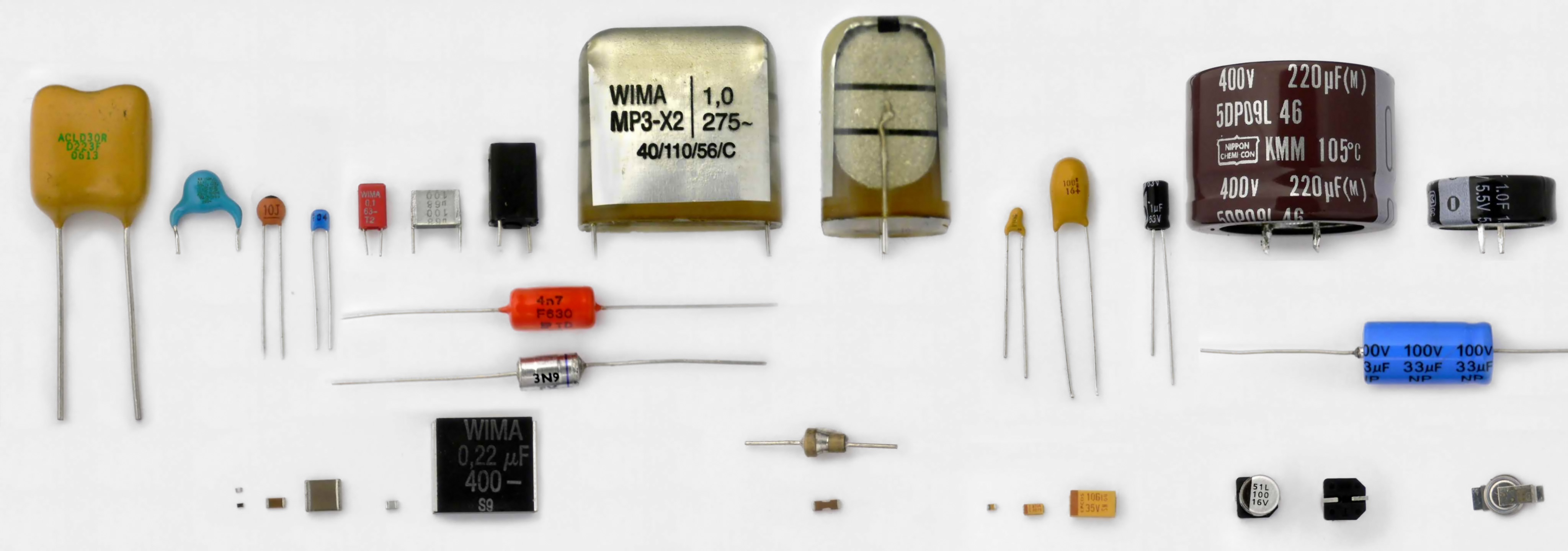 Kondensatoren zur Montage auf Platinen. Obere Reihe, radiale Anschlüsse (v.l.): Glimmer, Keramik-Y, Keramik-Scheibe, Keramik-Mehrschicht, Folie gewickelt und vergossen, geschichteter Folienkondensator, gewickeltes und vergossenes Polystyrol, gewickelter X-Metallpapierkondensator, dito hochkant (man sieht die großflächige Kontaktierung der Stirnseiten), zwei Tantal-lüsse: gewickelter Polypropylen-, Polystyrol-Folienkondensator, Keramik-Durchführungskondensator, bipolarer Elektrolytkondensator. Untere Reihe, SMD-Bauformen: zwei SiO2-, zwei Keramikkondensatoren, zwei Folienkondensatoren, Durchführungskondensator sowie SMD-Tantal- und Aluminium-Elektrolytkondensatoren.